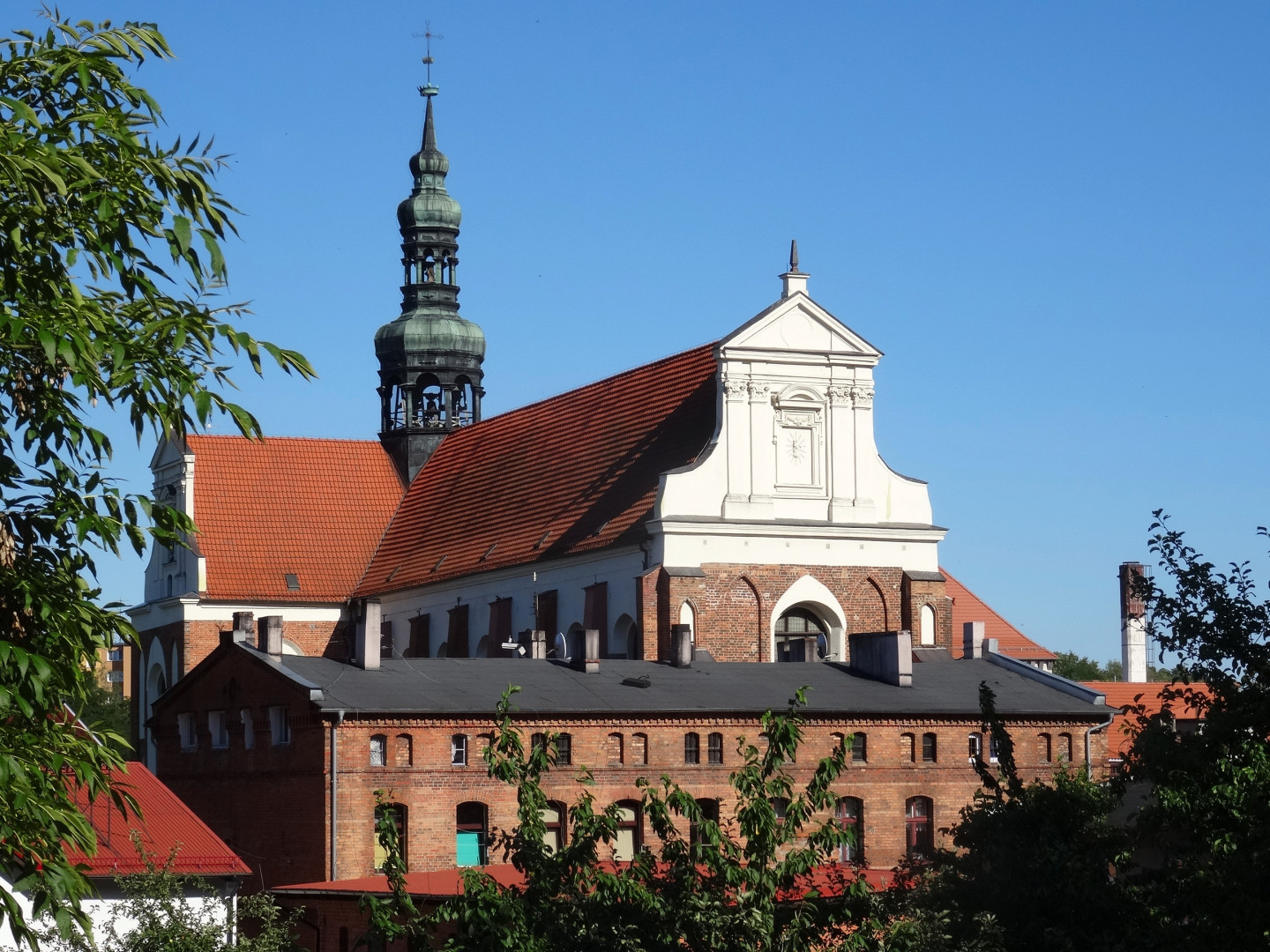 Bazylika Mniejsza Wniebowzięcia Najświętszej Maryi Panny w Koronowie - zespół pocysterski